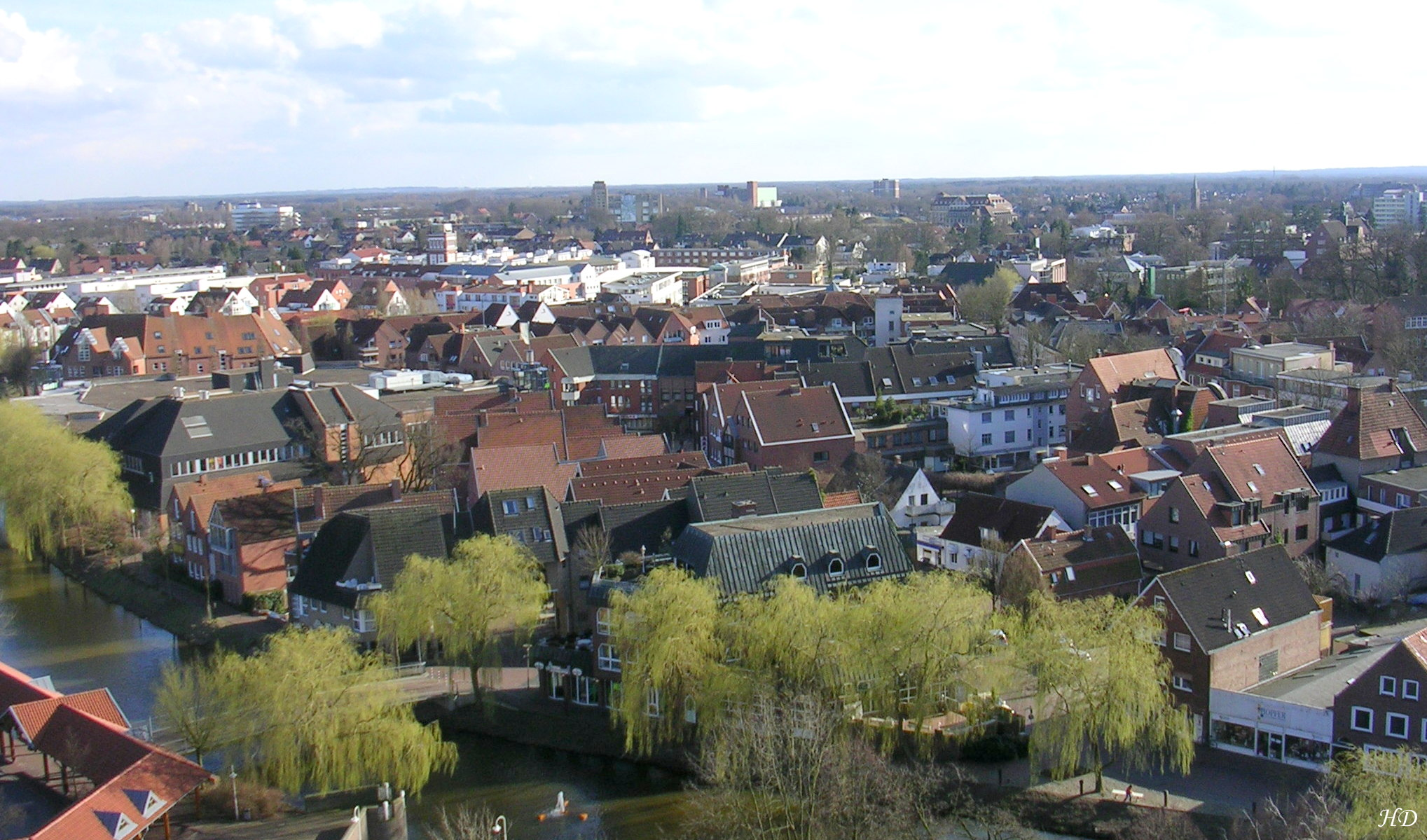 Blick über die Innenstadt